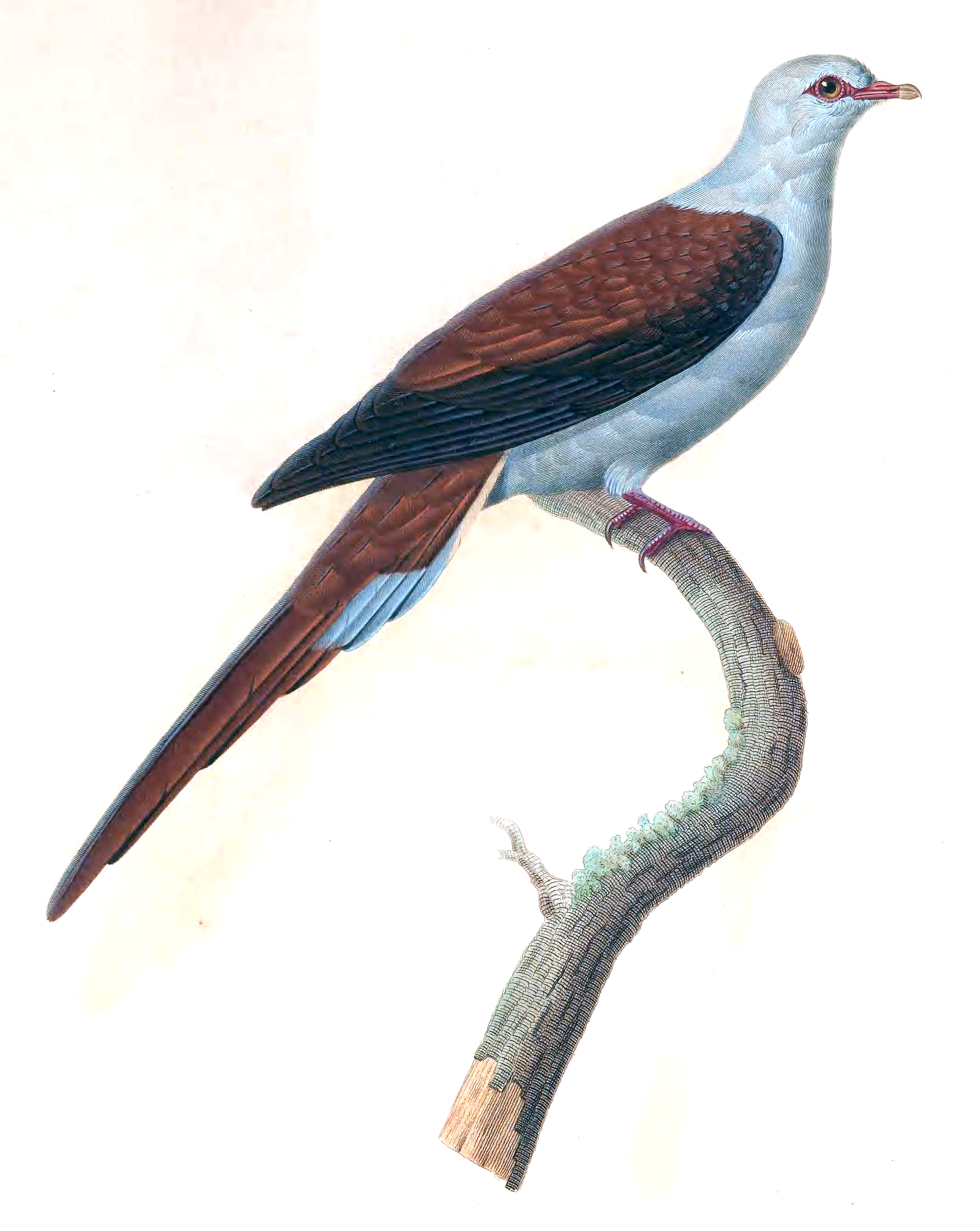 Illustration of Reinwardtoena reinwardti (Temminck, 1824 ; synonym : Reinwardtoena reinwardtii). From: Les Pigeons (Paris 1838-1845)